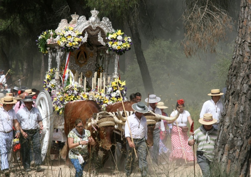 Hermandad del Rocío de Moguer en el camino del año 2014. Es la cuarta hermandad filial por antigüedad. Data del siglo XVII, aunque el primer documento que atestigua se existencia es del año 1718.